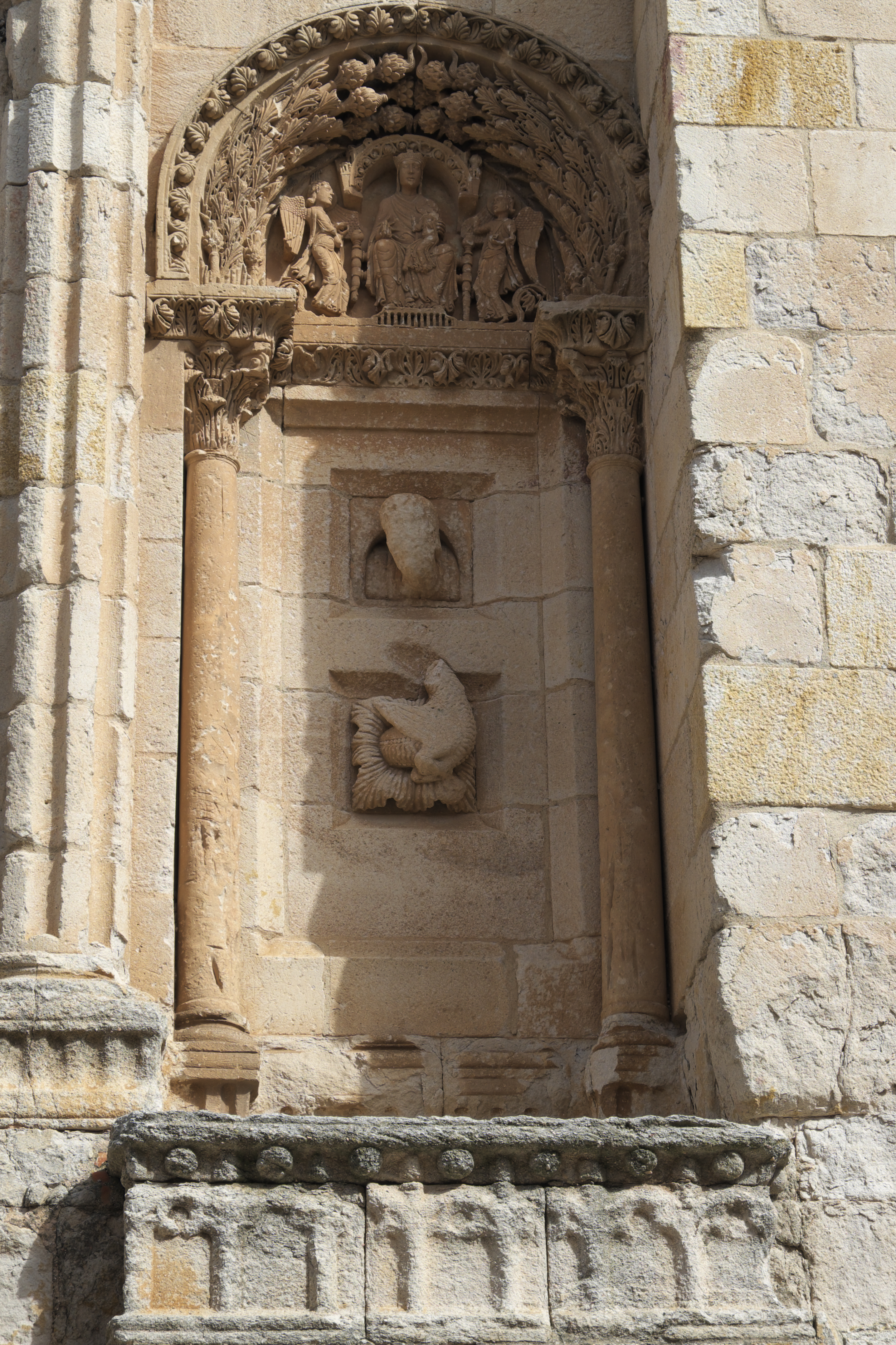 Kathedrale el Salvador in Zamora (Kastilien-León/Spanien), romanisches Südportal Puerta del Obispo aus dem 12. Jahrhundert